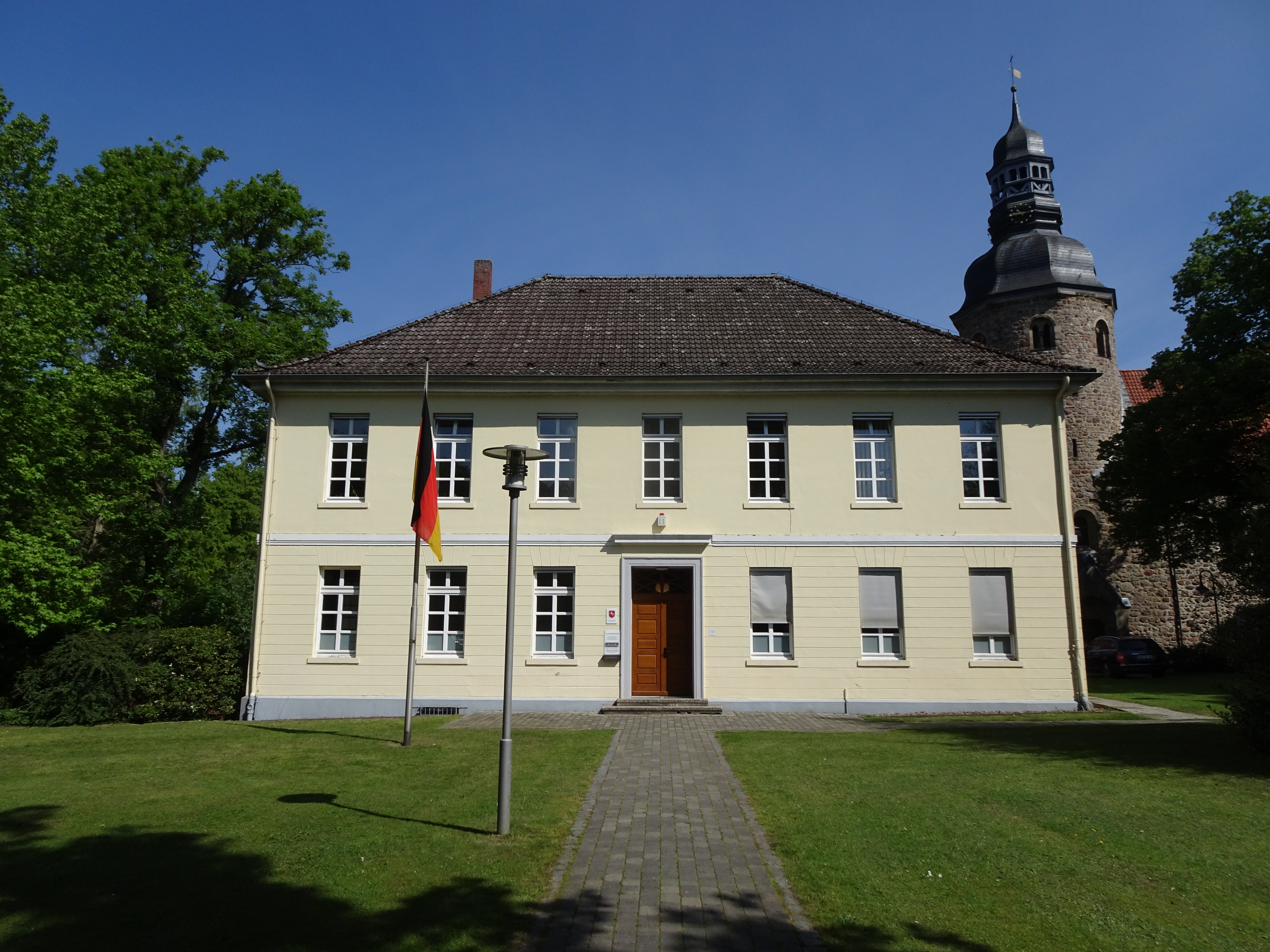 Amtsgericht Zeven